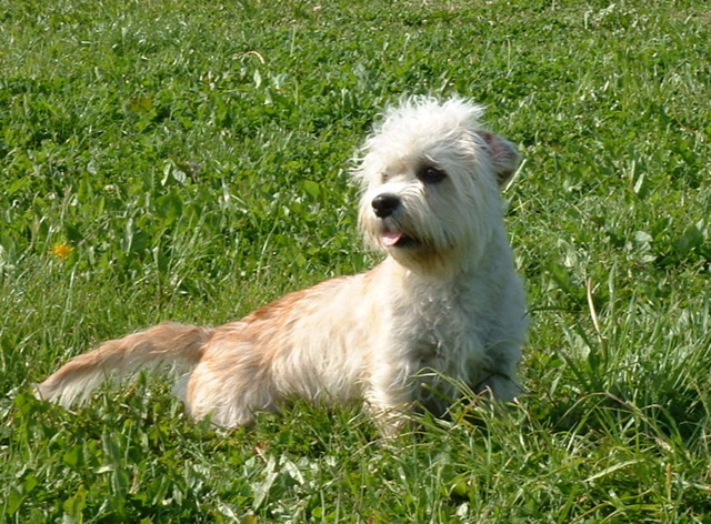 een foto van onze hond Bonfire Buddy van Treasure Island.Meer van hem is te zien op